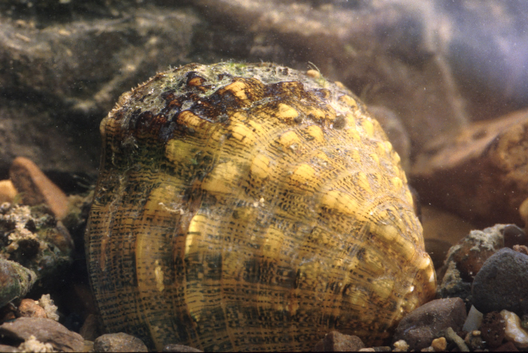 Cyprogenia stegaria